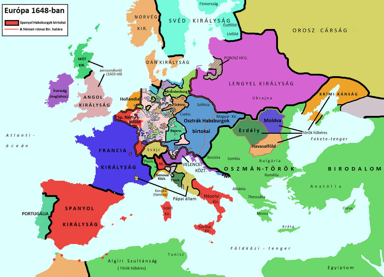 Európa 1648-ban, a harmincéves háború végén